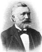 August Karl Julius Hartwig, scan from Die Gartenkunst 5 (1903), p. 87